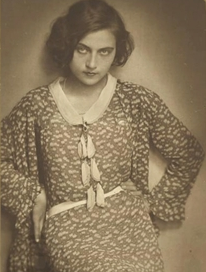 Anthoula Stathopoulou-Vafopoulou en 1924. Fotografía procedente de Μακεδονικές Ημέρες.